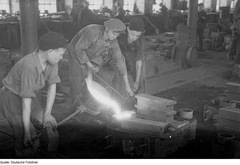 Original image description from the Deutsche FotothekPortrait von drei Gießern